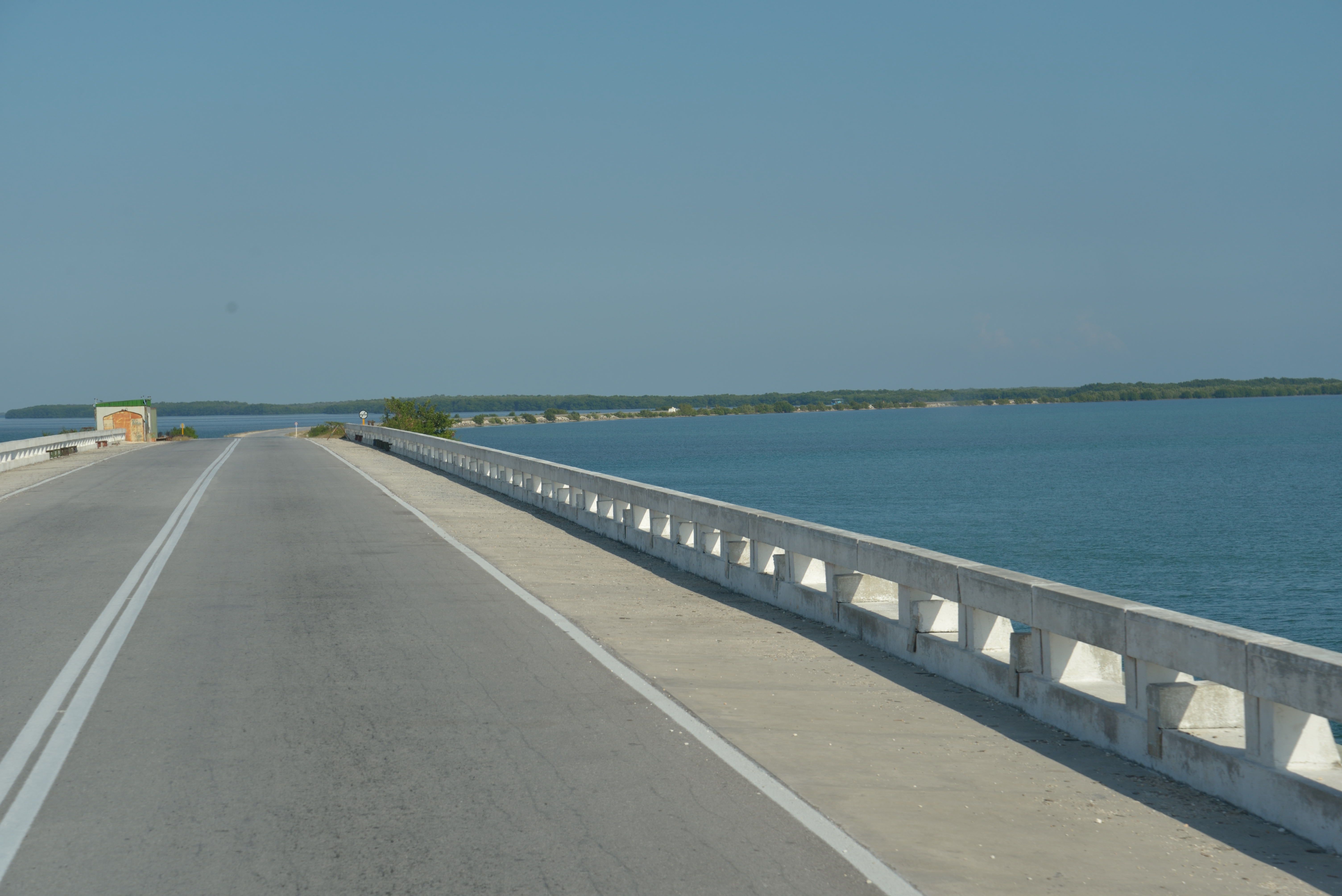 route de 50km au milieu de mangroves